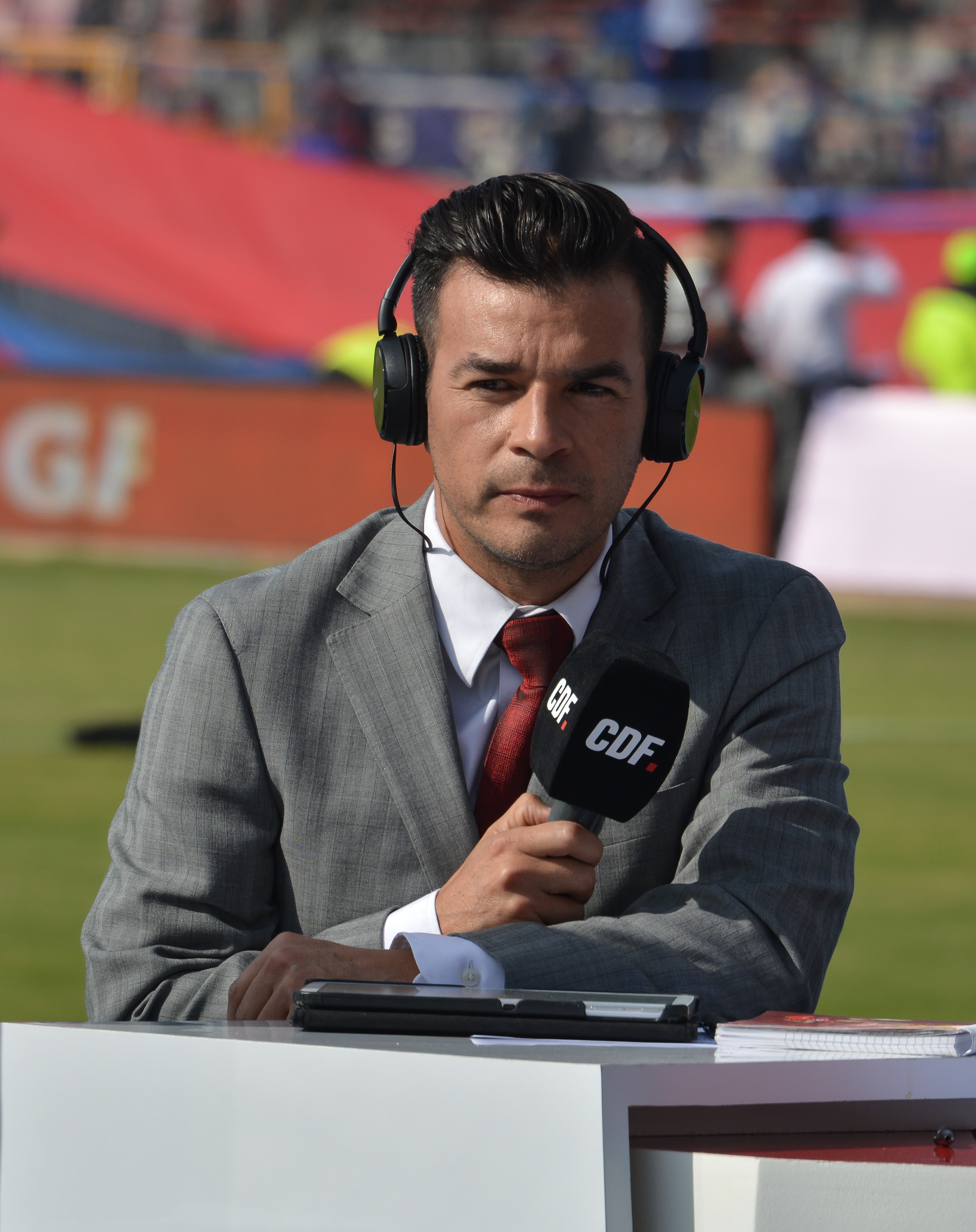 Sebastián González, Universidad de Chile v Colo-Colo, Estadio Nacional, Santiago, Chile.